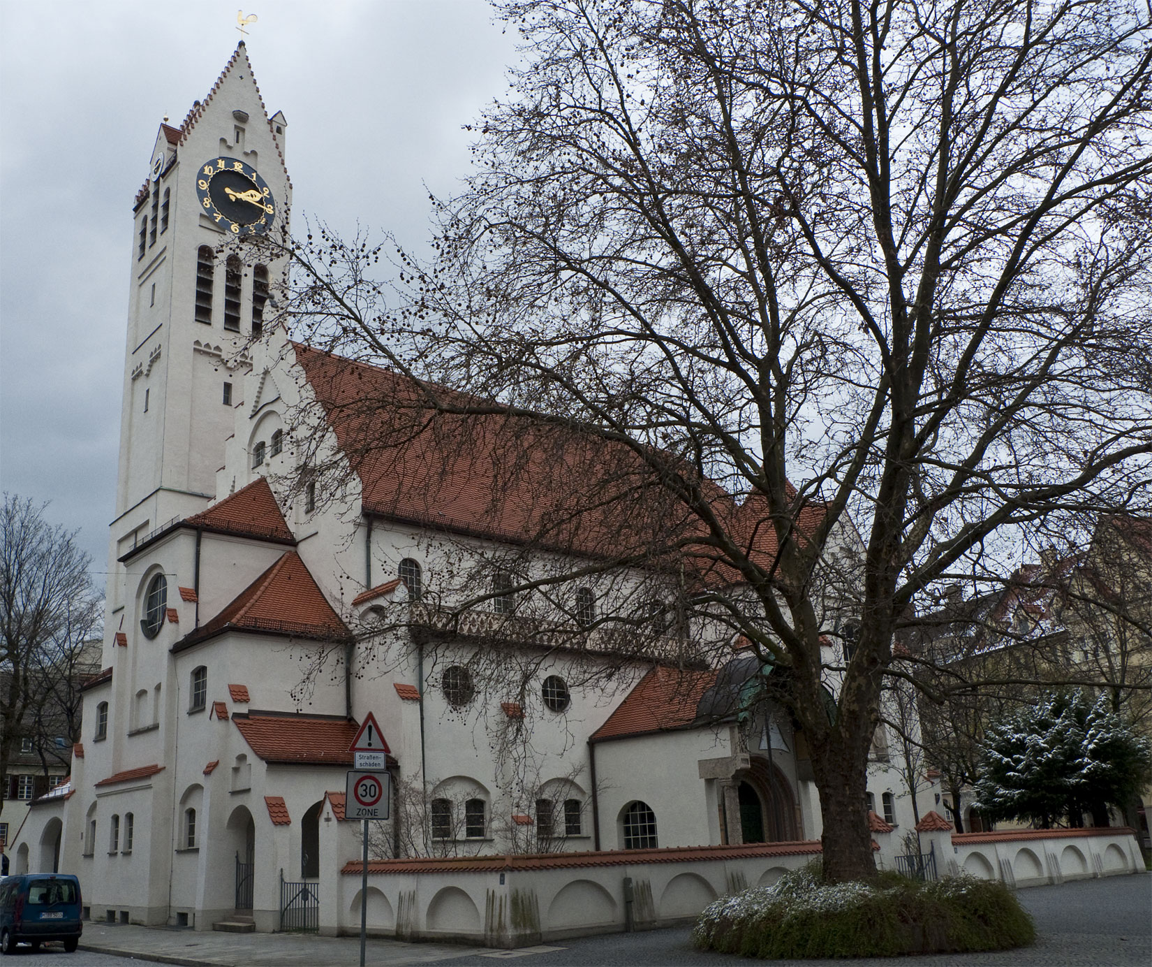 Erlöserkirche-München